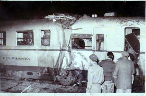 Choque de coches motor en la playa de km 3